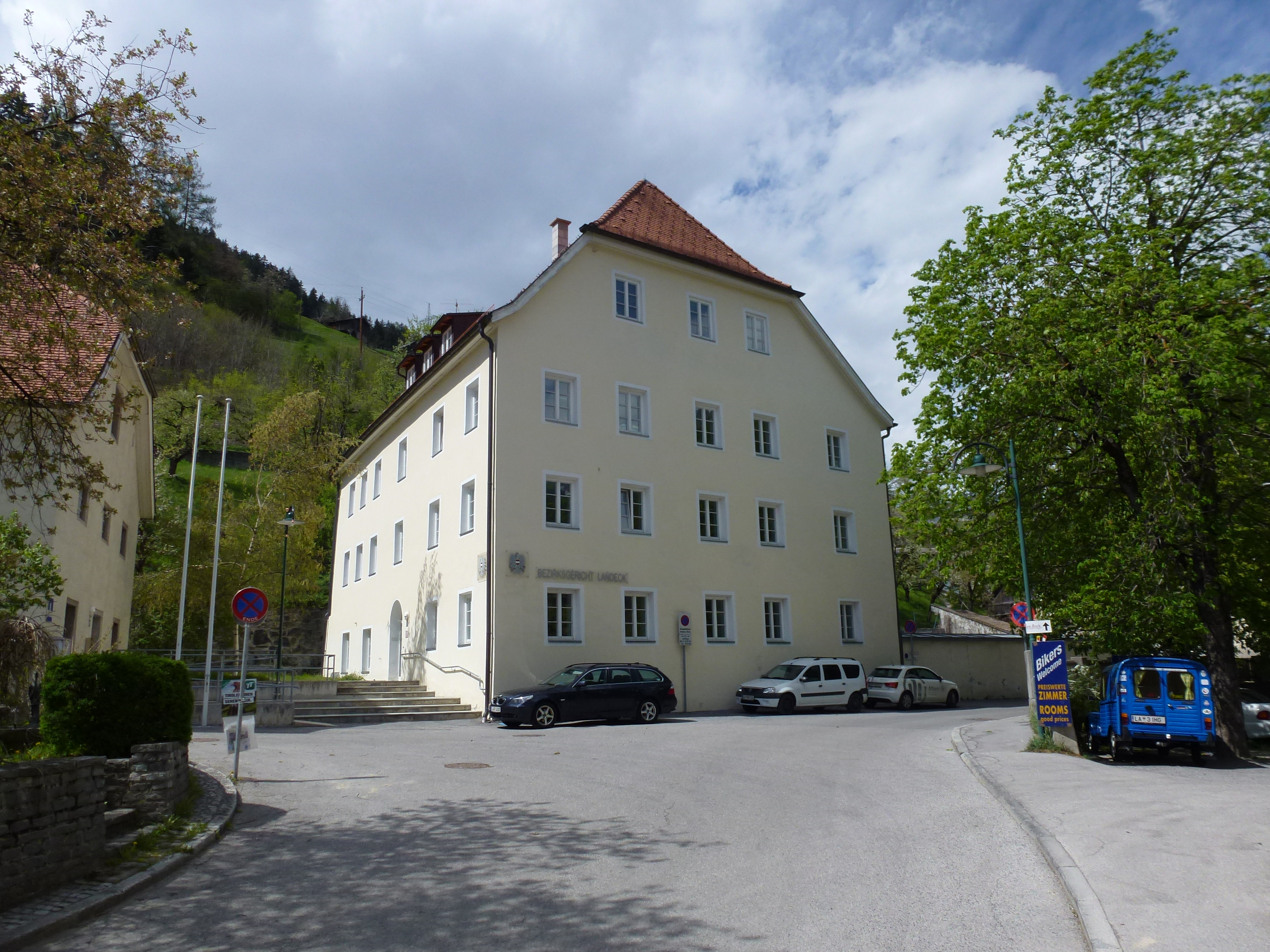 Ehem. Ansitz, Bezirksgericht und Gefangenenhaus - Herzog-Friedrich-Straße 19, 21, Landeck This media shows the remarkable cultural object in the Austrian state of Tyrol listed by the Tyrolean Art Cadastre with the ID 24335. (on tirisMaps, pdf, more images on Commons)